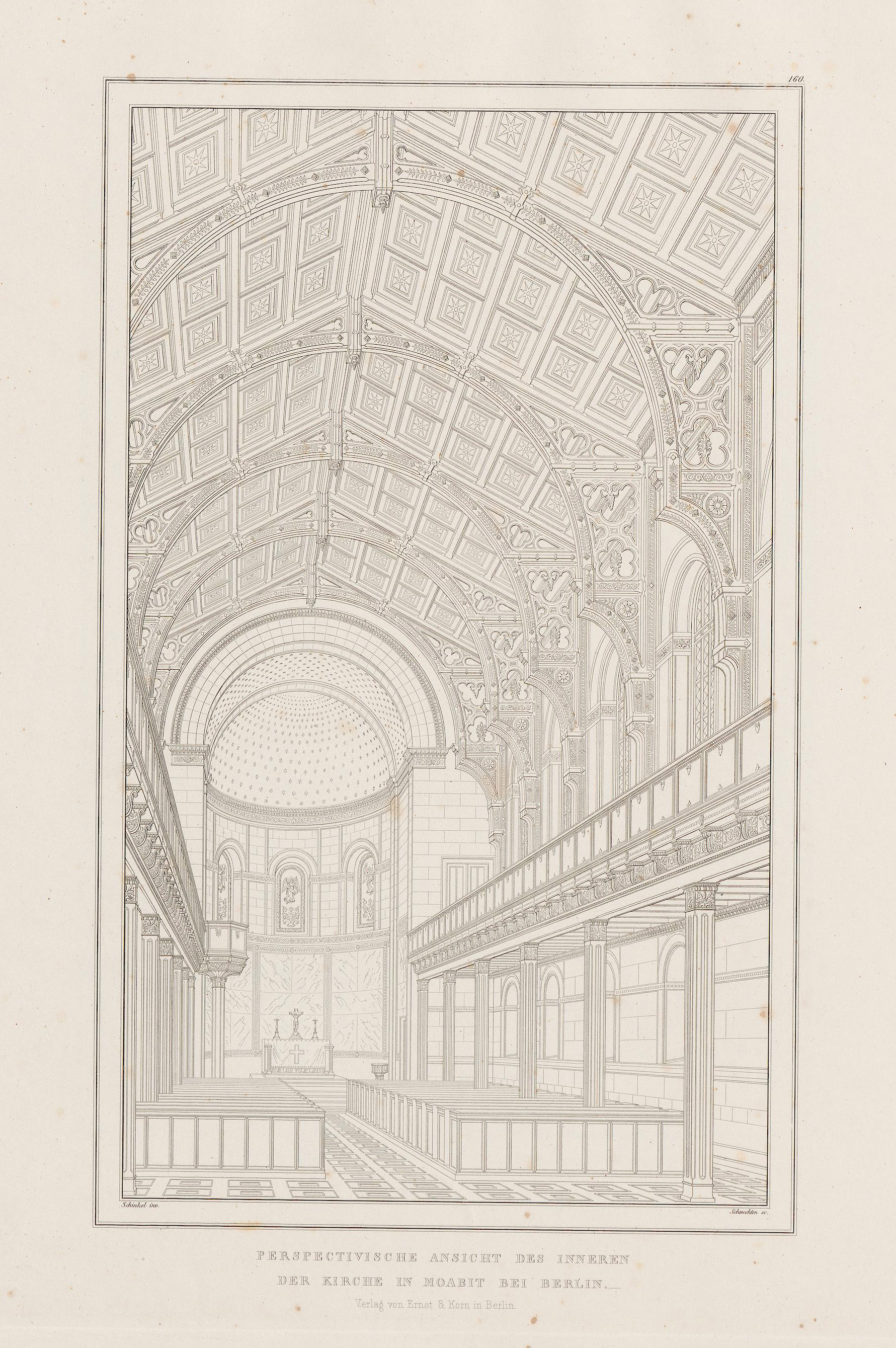 Johanniskirche Berlin, Innenraumperspektive von Schinkel